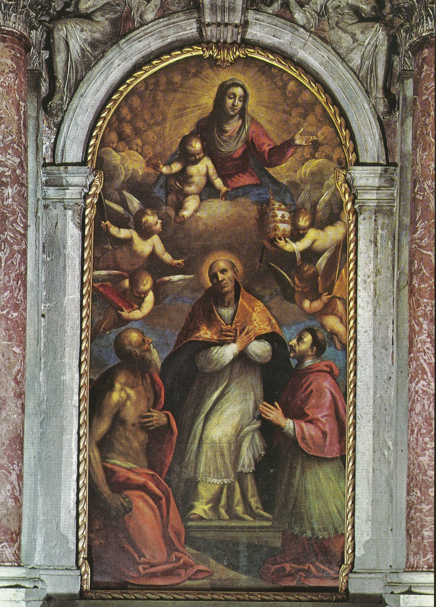 Madonna con Bambino, s. Stefano I, s. Girolamo e s. Carlo Borromeo - Cattedrale di Lesina, Croazia